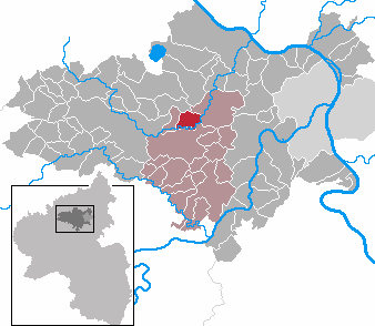 Welling in Rhineland-Palatinate - district Mayen-Koblenz